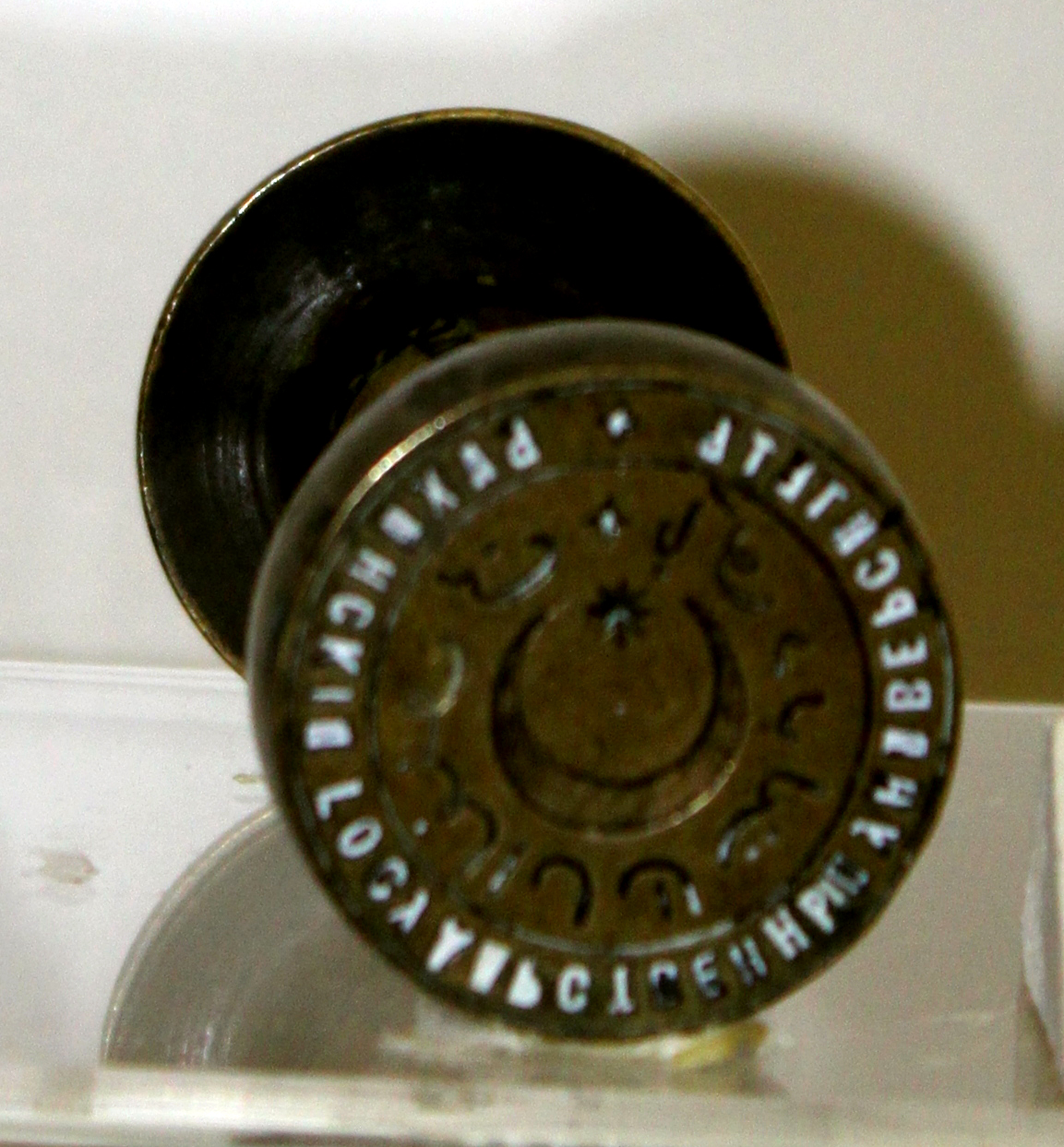 Bakı Dövlət Universitetinin möhürü